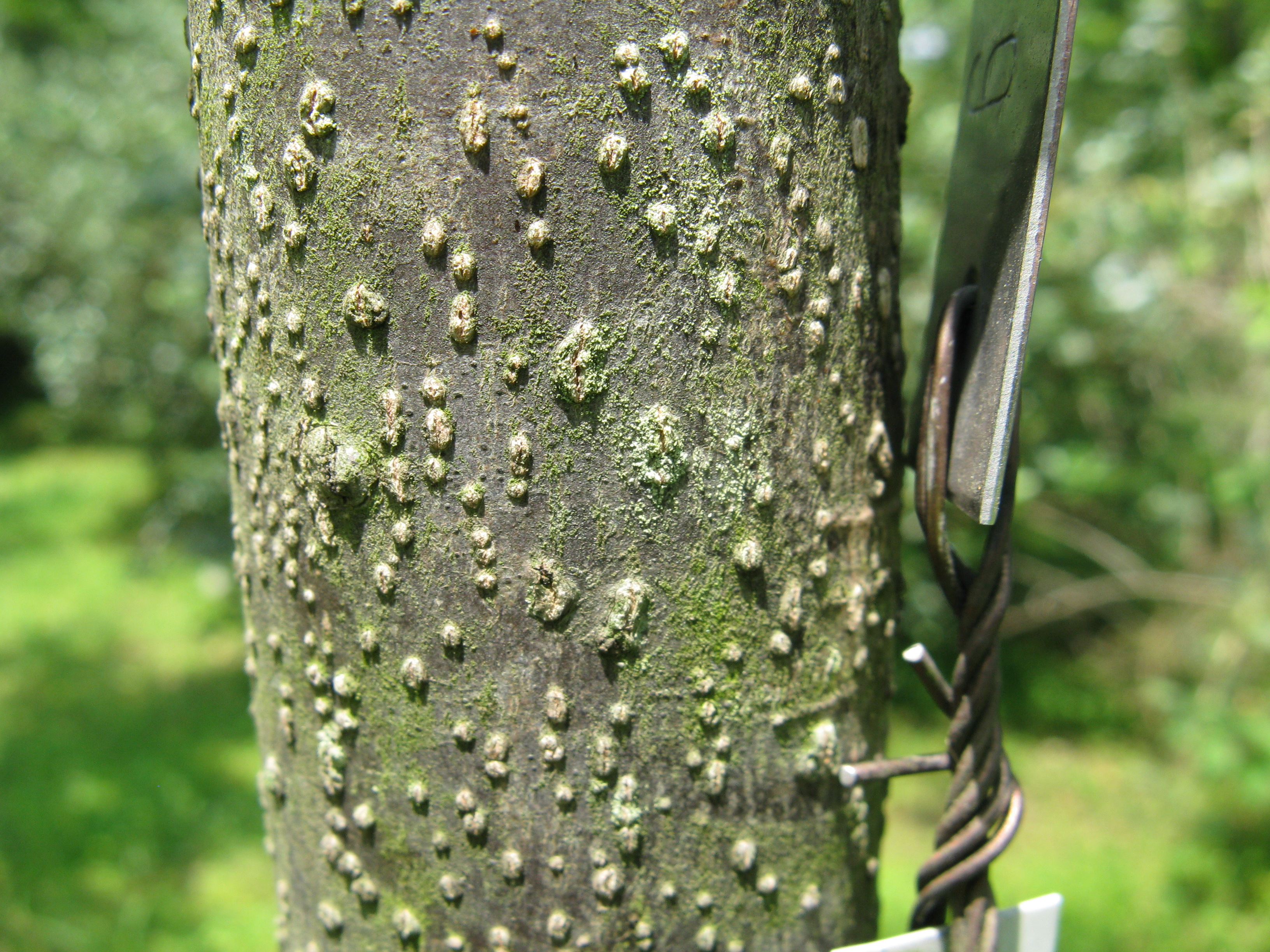 Scientific name Diospyros lotus